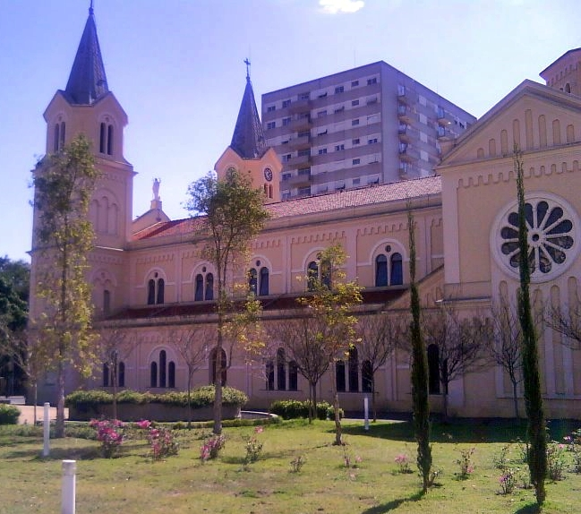 Igreja Matriz de Rio Claro